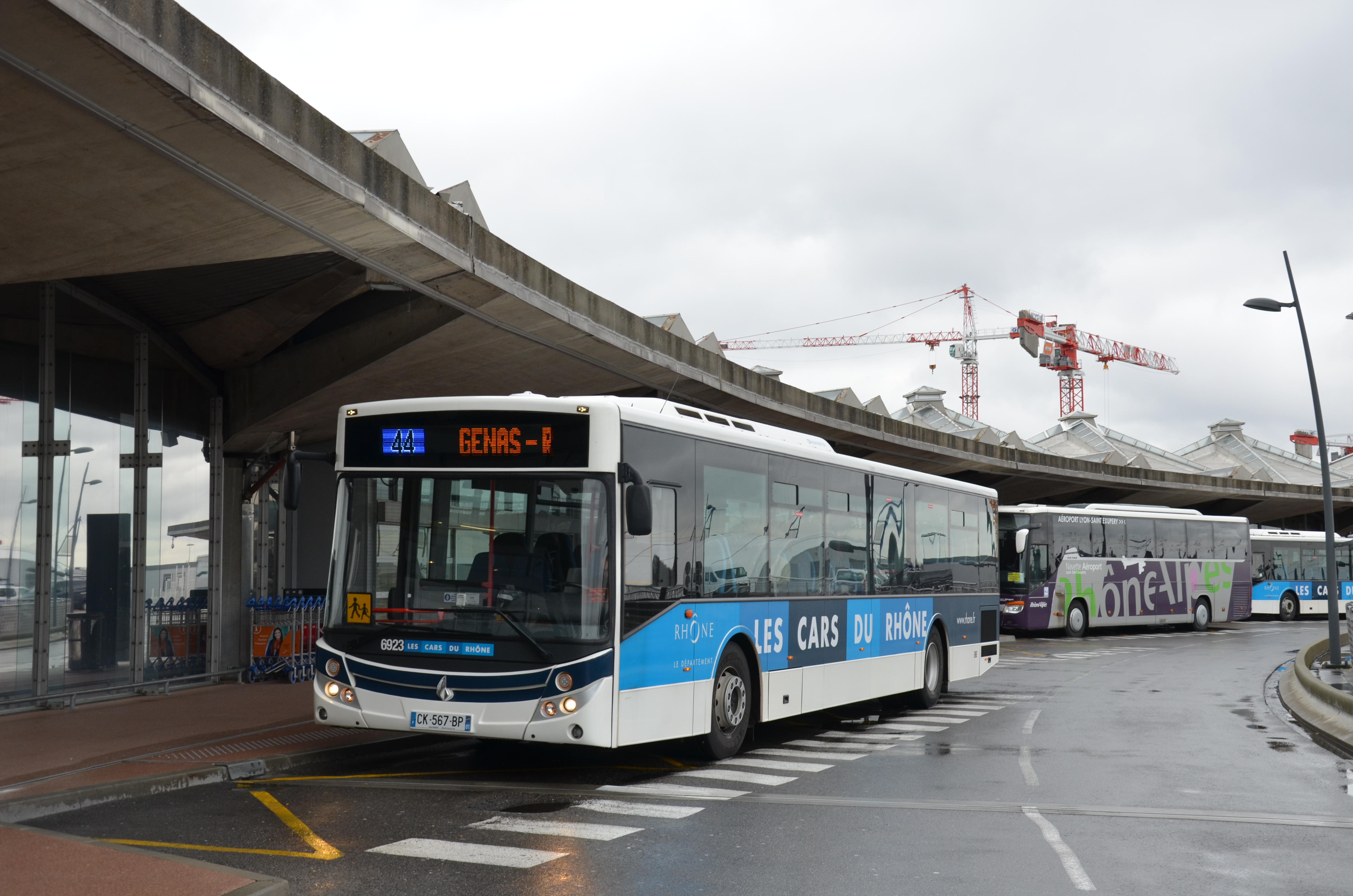 Fast Starter LE n°6923, sur la ligne 44 des Cars du Rhône à destination de Genas-Rond-point de l’Épine.